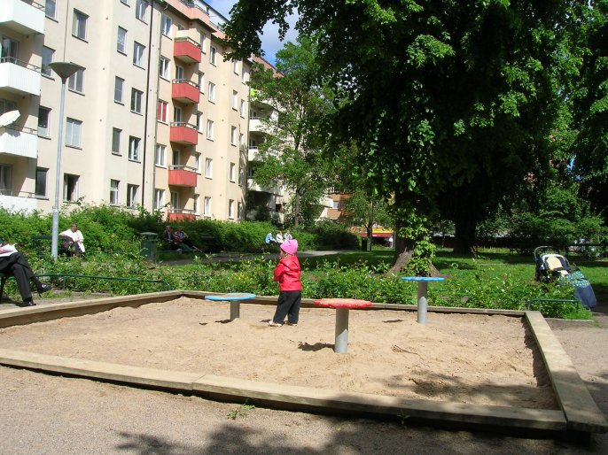 Axel Landquists park, Södermalm, Stockholm, Sweden.